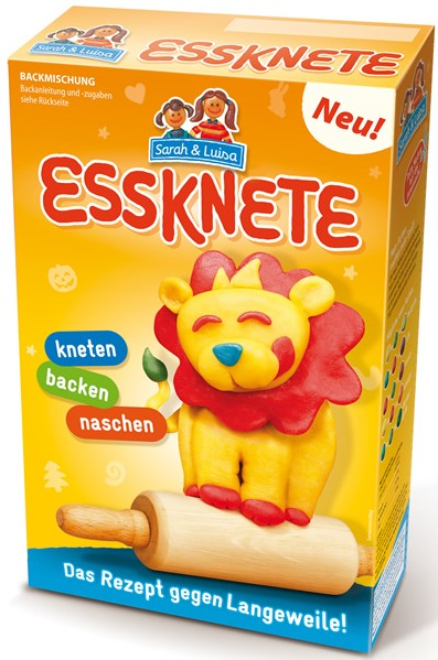 Das Essknete-Logo der 123 Nährmittel GmbH auf einer Packung Essknete